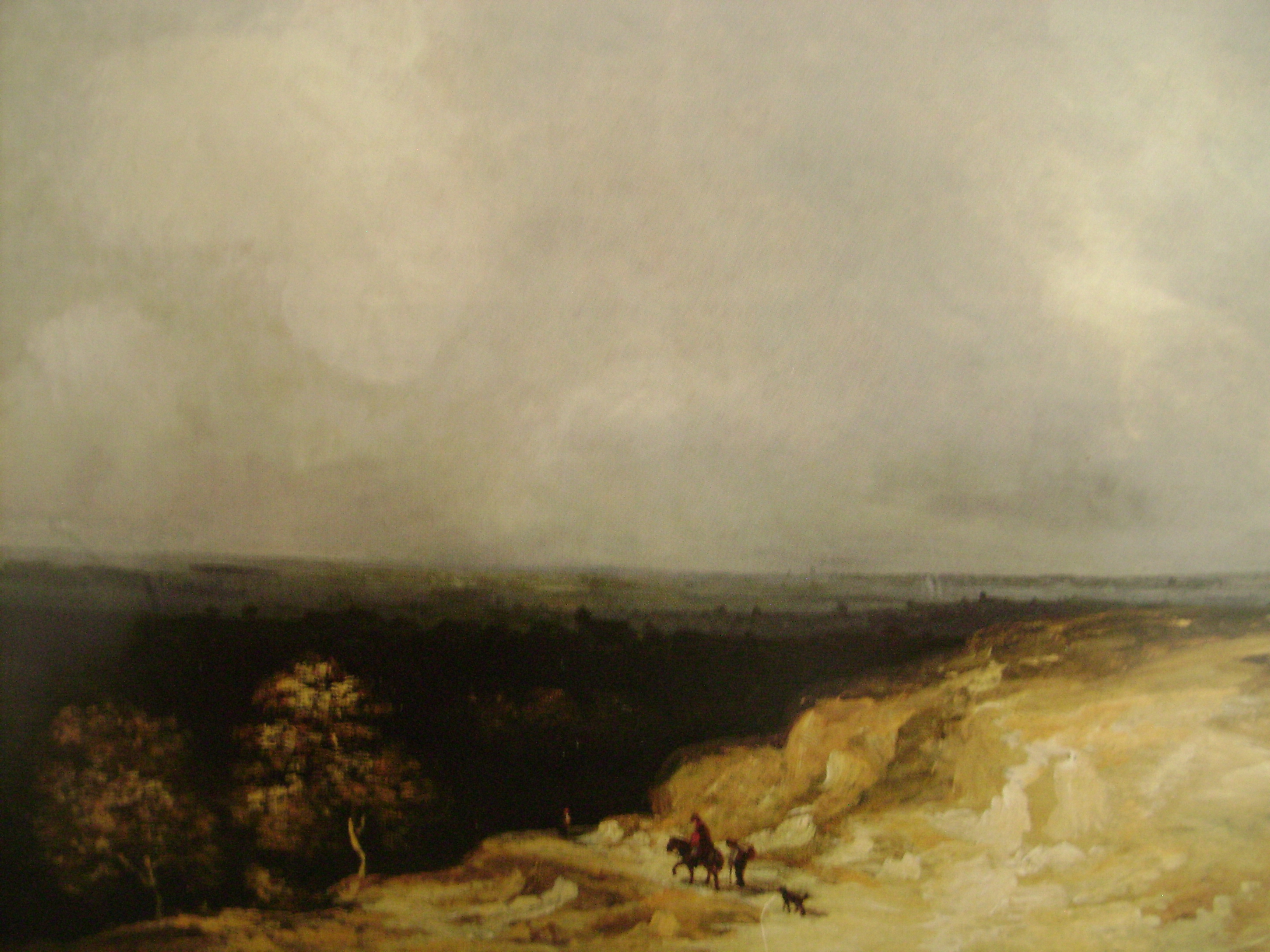 Georges Michel (1763-1843), huile sur toile 50 x 72 cm. Origine : Collection Heim-Gairac, actuellement collection particulière France. N° 29 du catalogue de l’exposition organisée par Pierre Miquel, Le Pavillon des Arts à Paris, du 2 juin au Ier juillet 1967.